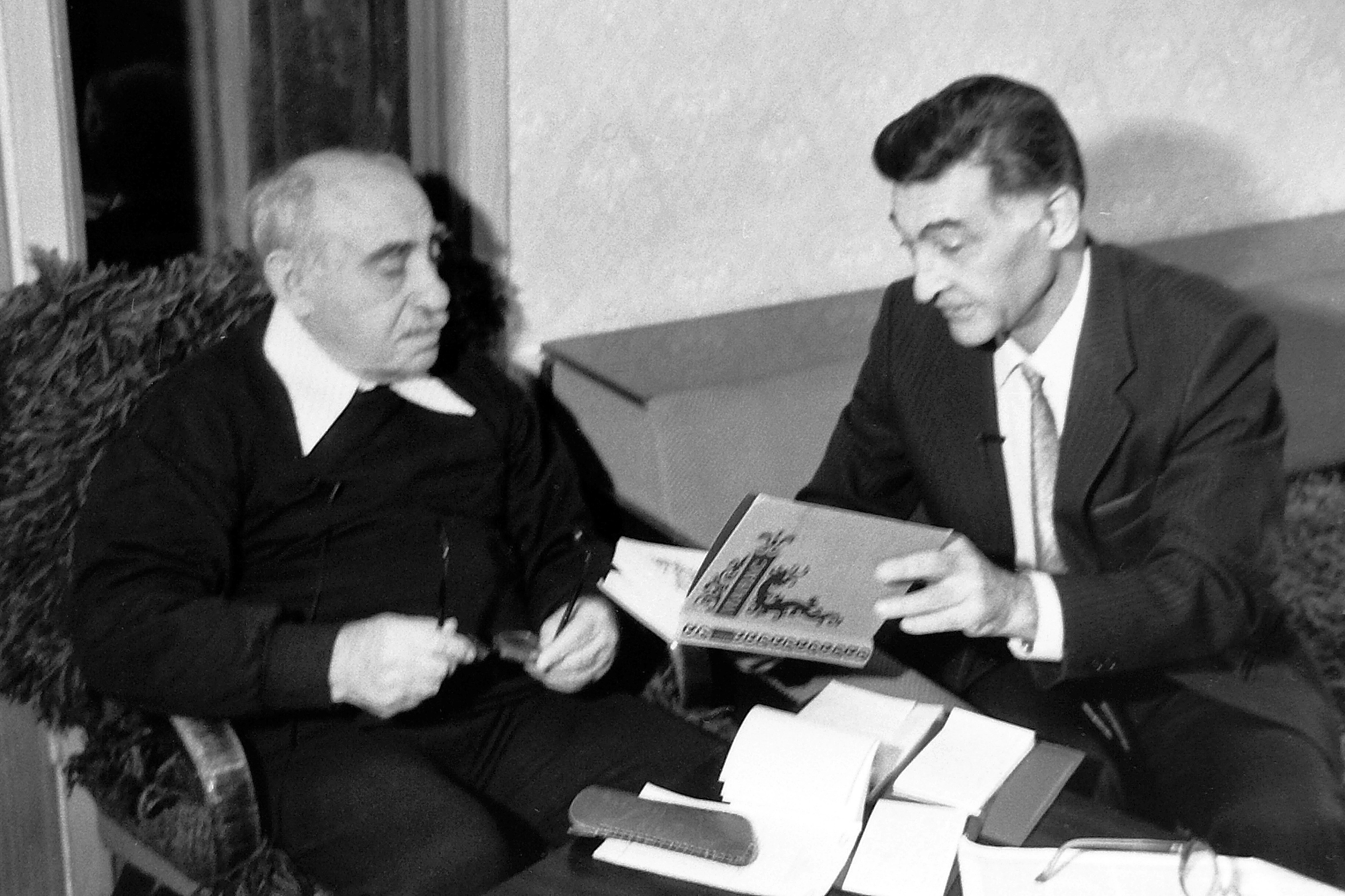 Валерий Ровинский у Семёна Липкина